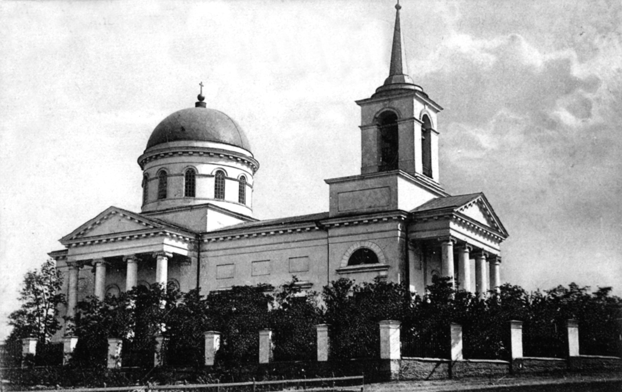 Nicholas church in Luhansk